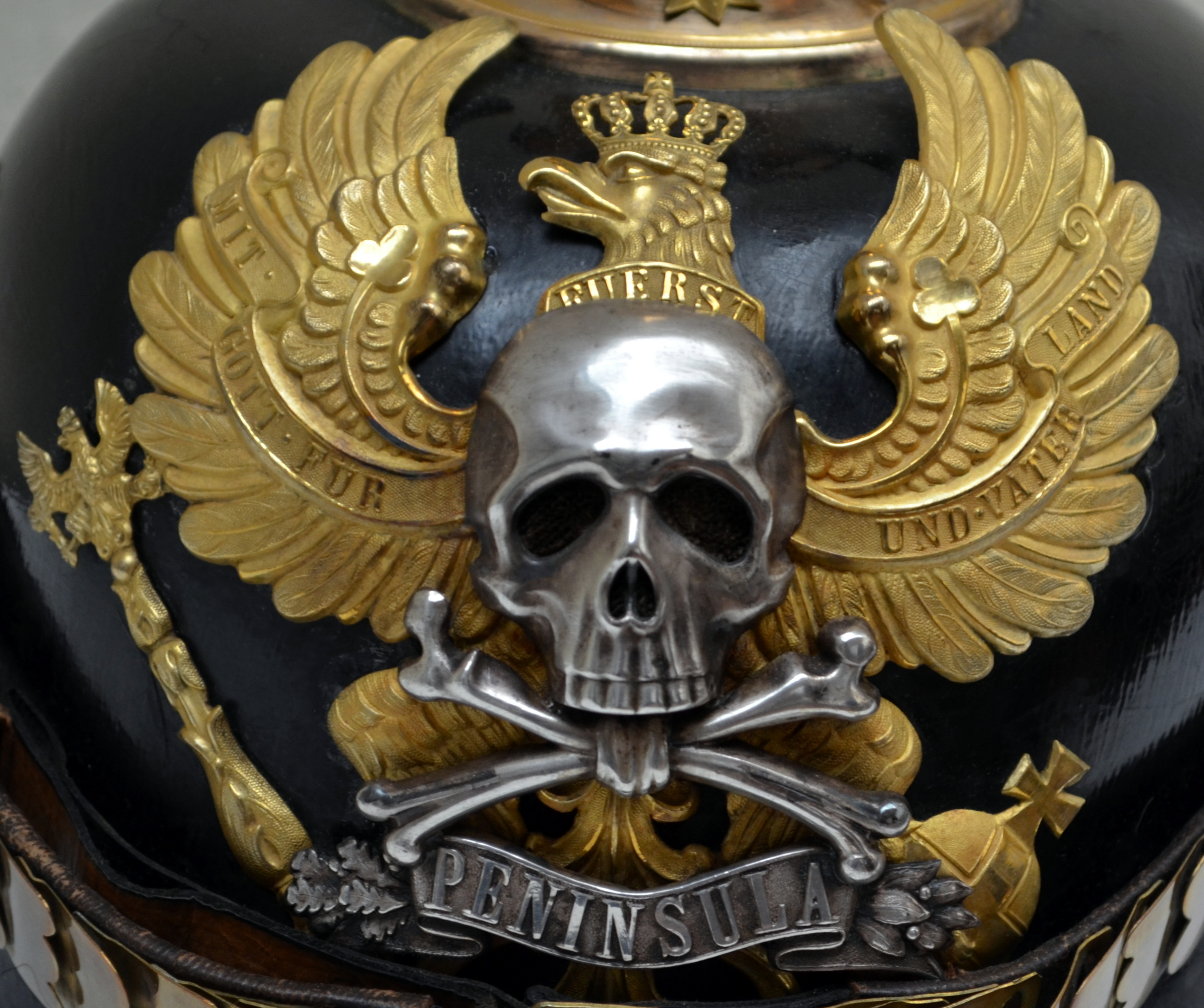 Braunschweigisches Landesmuseum: Detail des Paradehelms Johann Albrechts von Mecklenburg, von 1907–1913 letzter Regent des Herzogtums Braunschweig. Es handelt sich um einen Offiziershelm des Braunschweigischen Infanterieregiments Nr. 92, der Adler mit aufgelegtem Braunschweiger Totenkopf mit Peninsula-Band. Der Schriftzug „Peninsula“ (engl. Halbinsel) erinnert an die Teilnahme braunschweigischer Trupppen an den Schlachten auf der Iberischen Halbinsel gegen Napoleon während der Befreiungskriege.